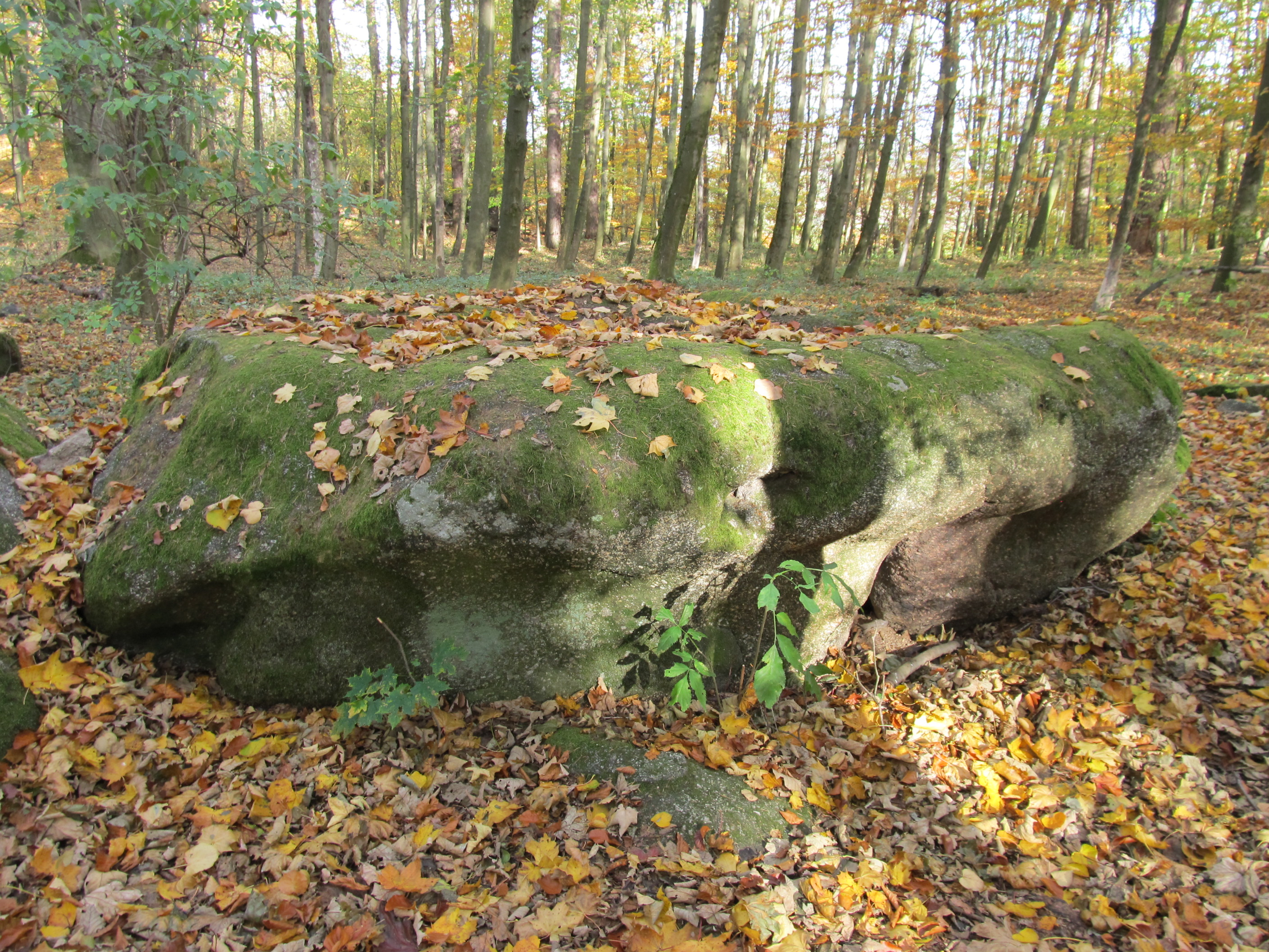 Kámen Loupežnický stůl na vrcholu Velkého Mehelníku